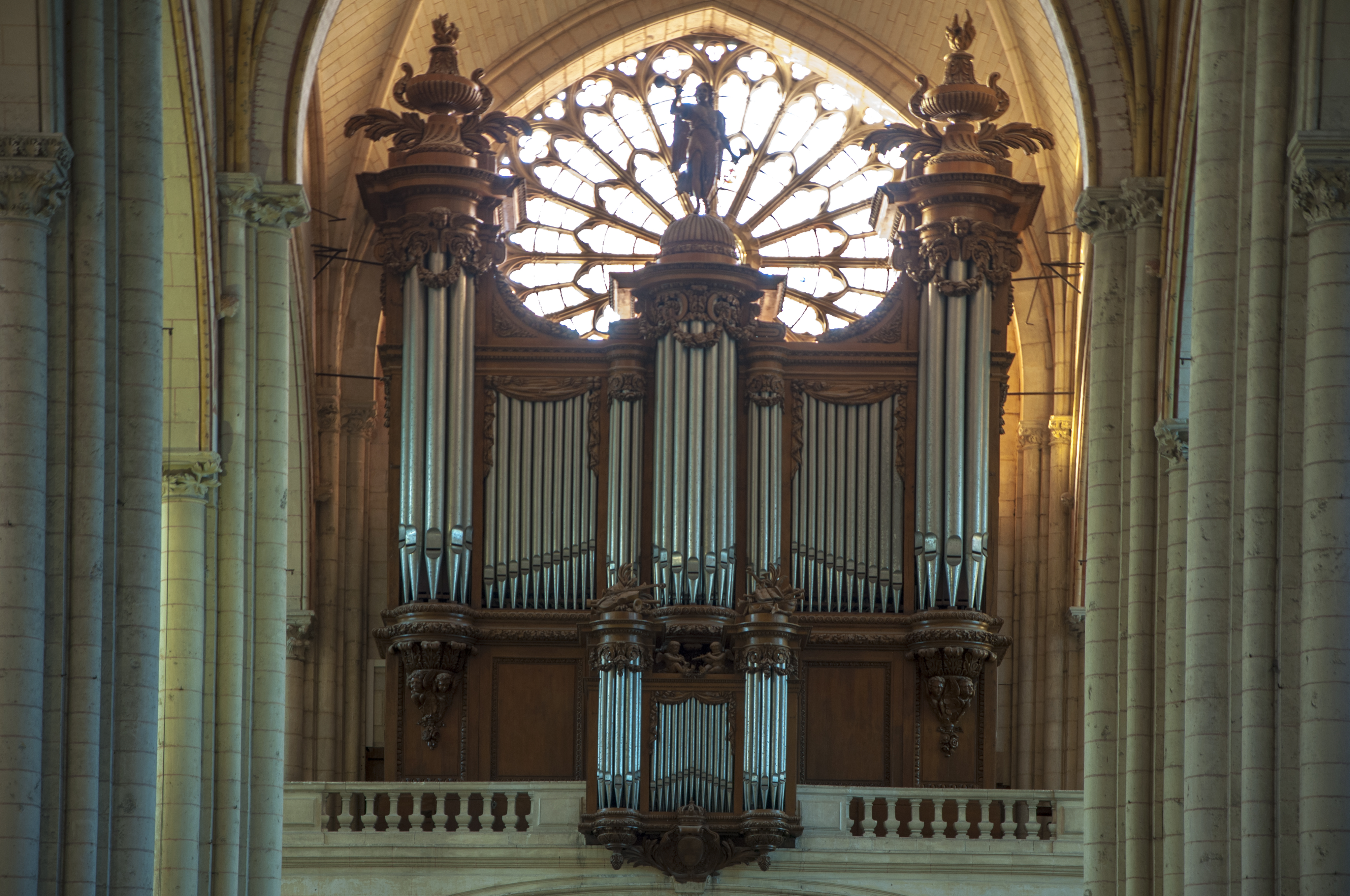 L'orgue de la cathédrale de Poitiers, que l'on doit à François-Henri Clicquot - issu d'une célèbre famille de facteurs d’orgues - fut édifié au XVIIIe siècle. Composé de trois milles tuyaux, il est constitué de quarante-quatre jeux, quatre claviers manuels et un pédalier, deux tremblants et neuf soufflets. En 1908, il fut classé au titre des Monuments historiques.